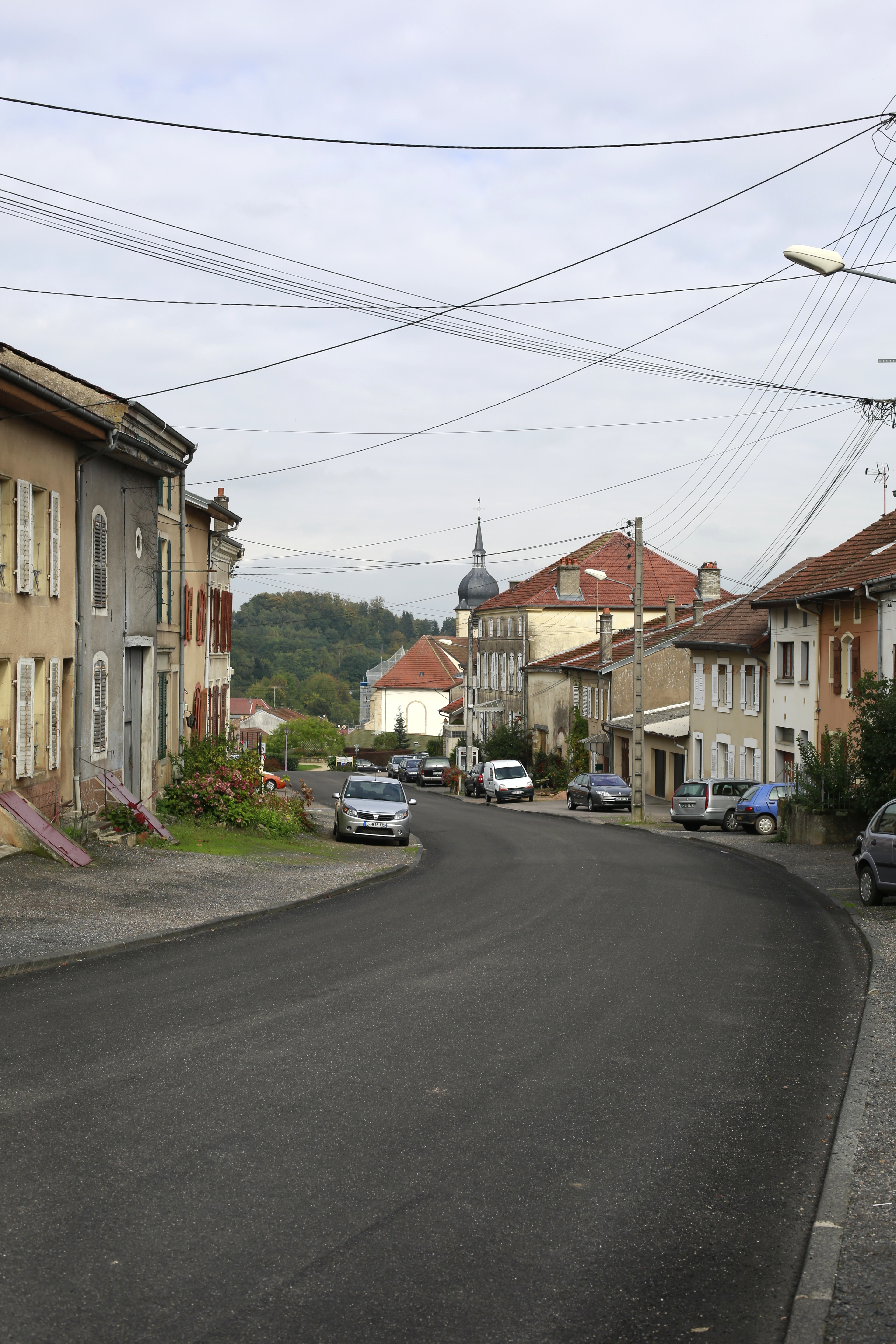 La Grande Rue de Deneuvre avec son usoir caractéristique.